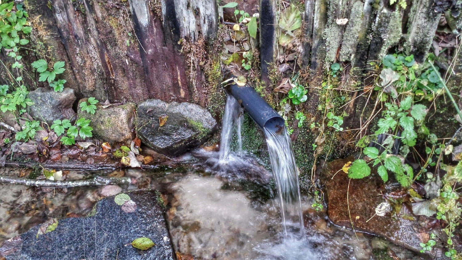 Kaldbekk-kilden ved Munkevad på Ringerike har vært drikkevannskilde gjennom århundrer.